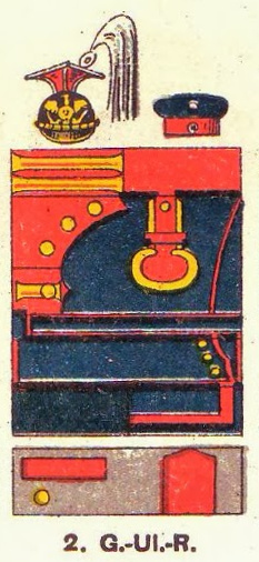 Schematische Farbdarstellung der Uniform des 2. Garde-Ulanen-Regiments